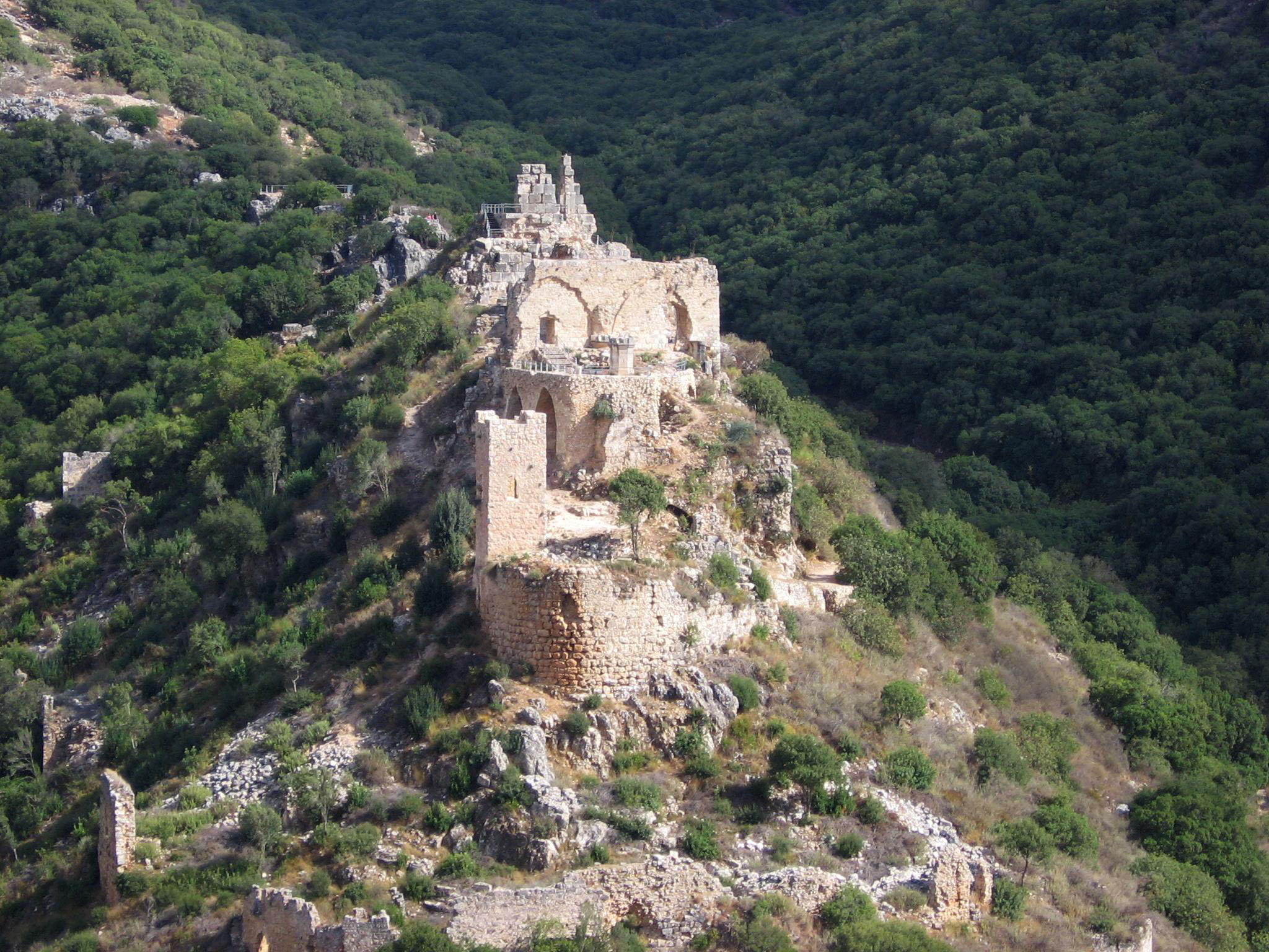 מה יש להוסיף? (למה אין סיווג נוסטלגיה?)